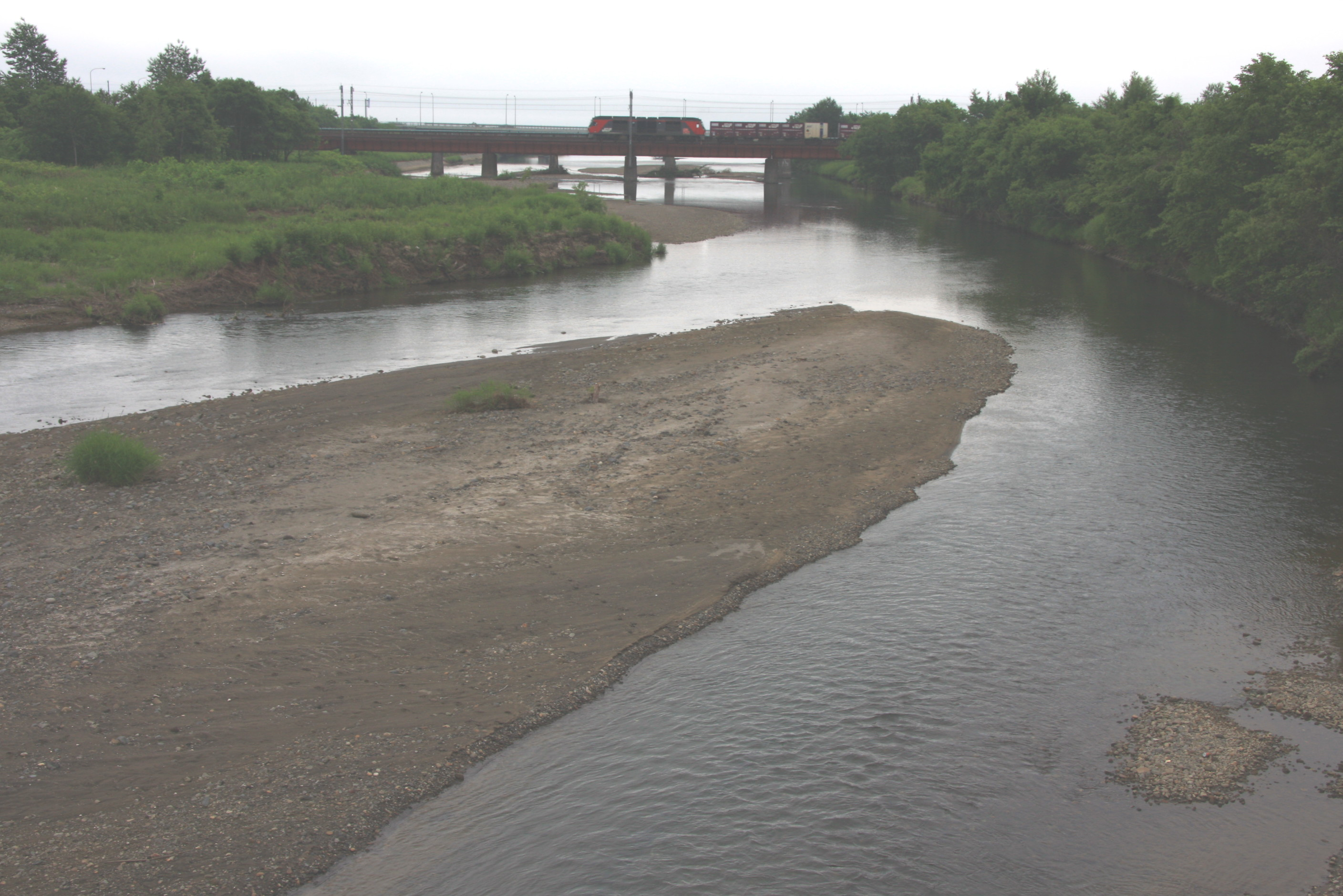 白萩大橋より望む白老川下流